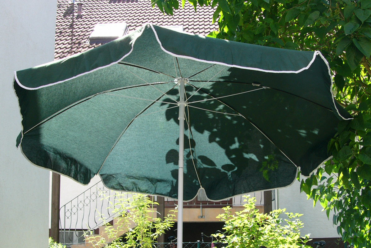 Grüner Sonnenschirm